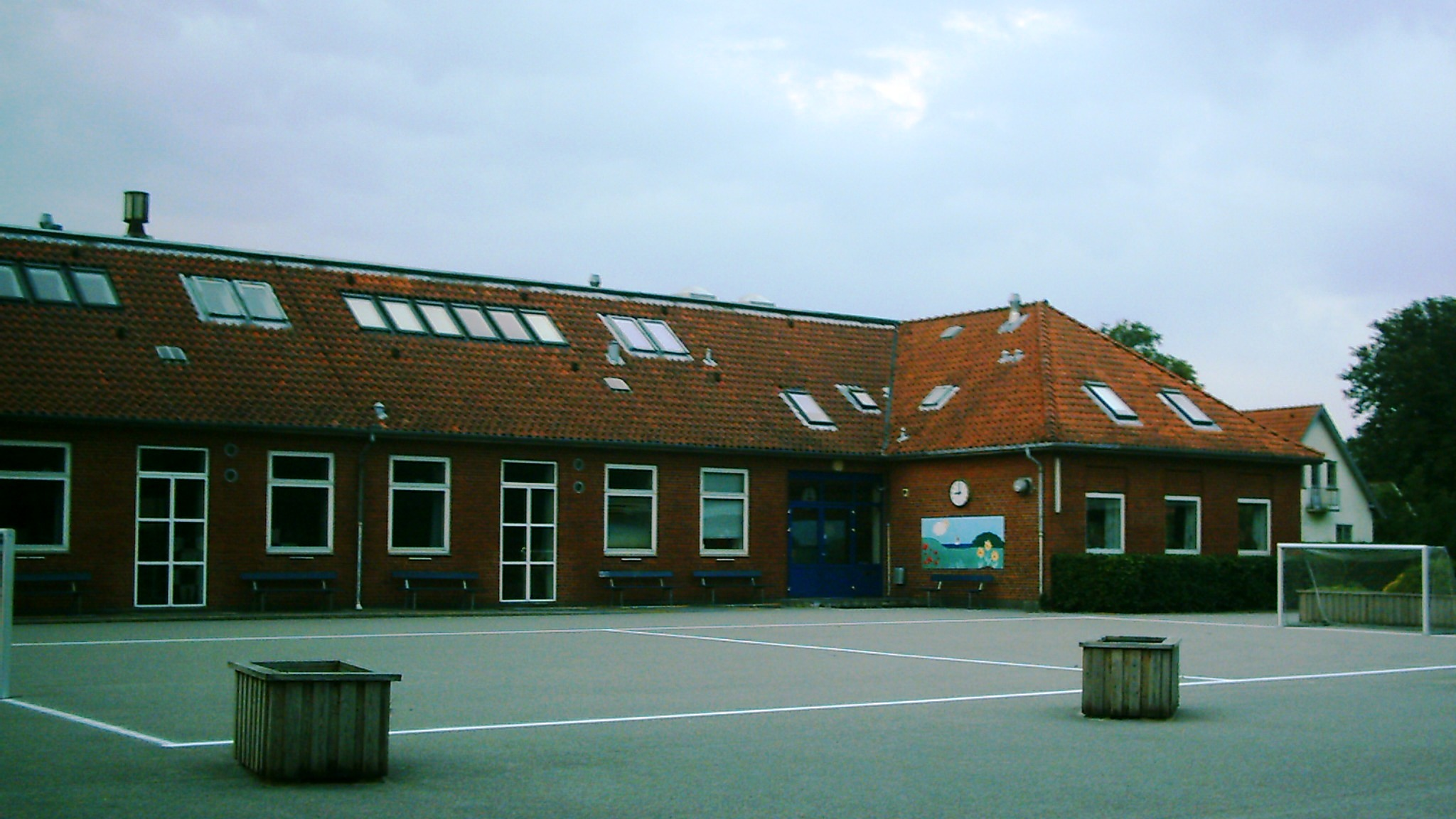 Andst skole